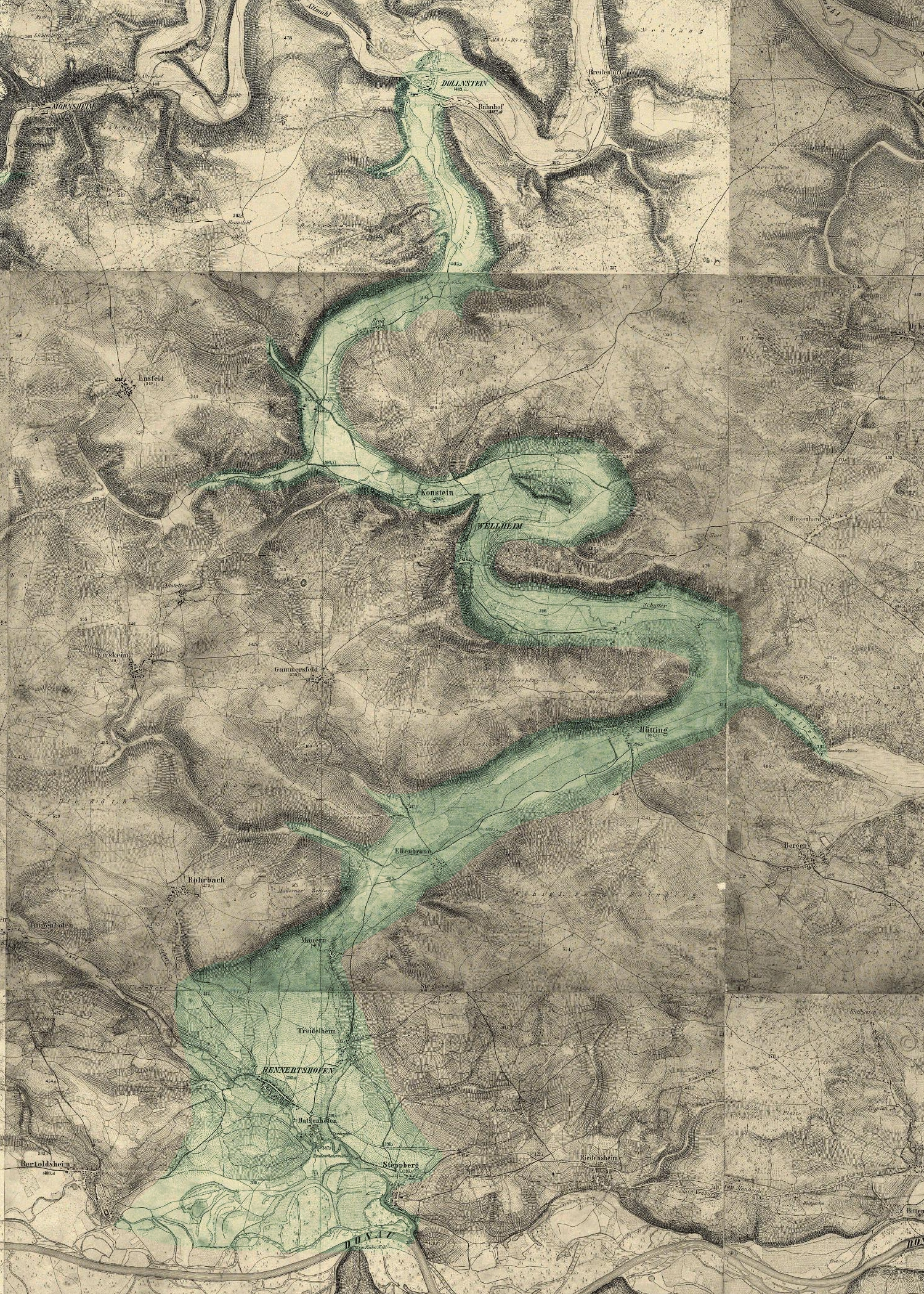 Verlauf des Wellheimer Trockentals, ehemaliges Flusstal. Das große Tal wurde von einer pliozänen Urdonau ("Altmühdonau") geformt. Auf Basis einer historischen Karte von 1875-1877, Bearbeitung eigene Arbeit.